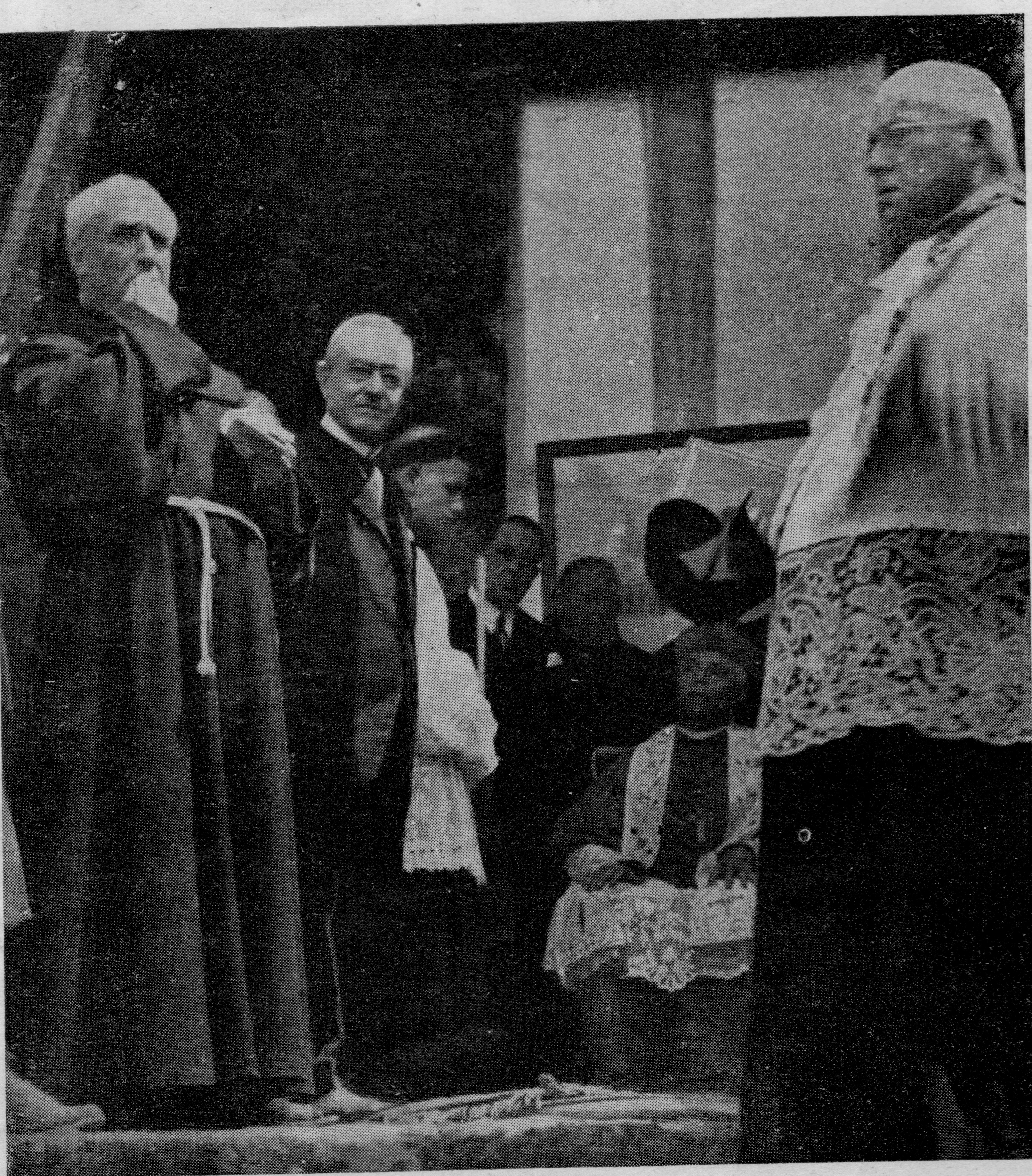 Costruzione della Cupola